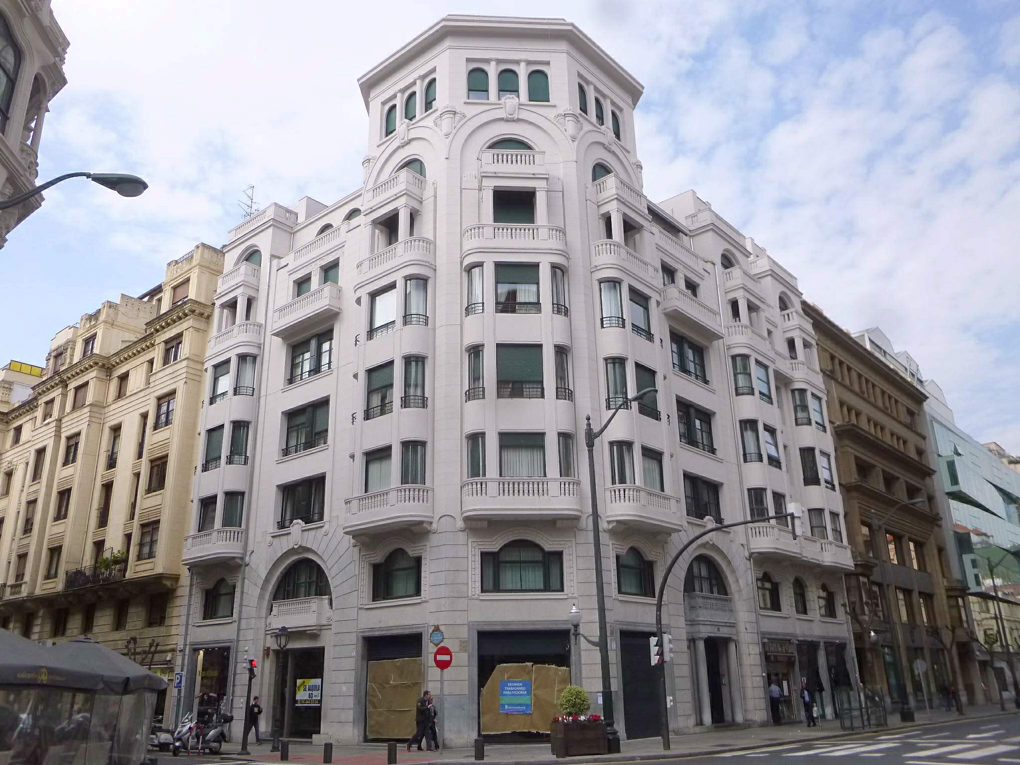 Bilbao - Alameda de Recalde 32